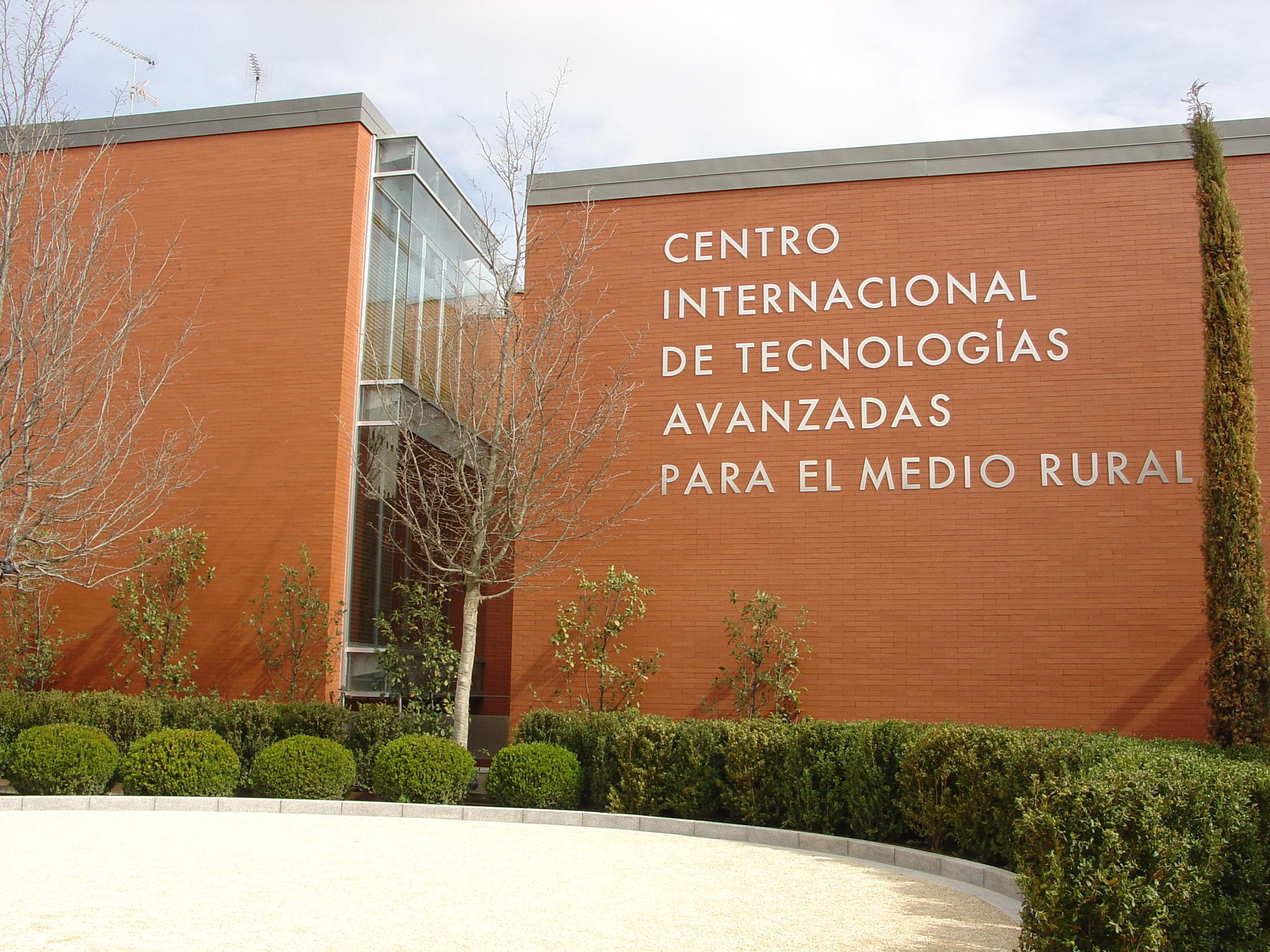 Perteneciente a la Fundación Germán Sánchez Ruipérez